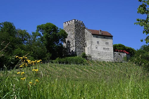 Habsburg (Nr. 03.1-5036)